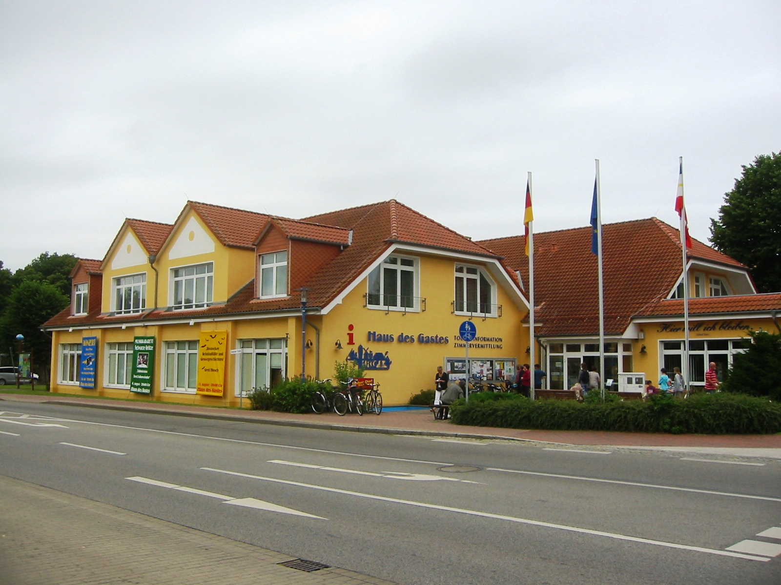 Touristeninformation "Haus des Gastes" in der Rostocker Straße in Graal-Müritz